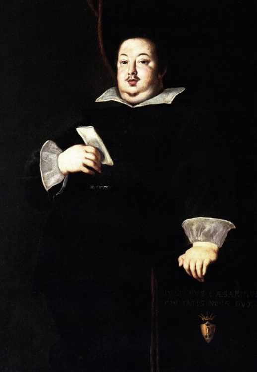 Ritratto del duca giuliano II cesarini